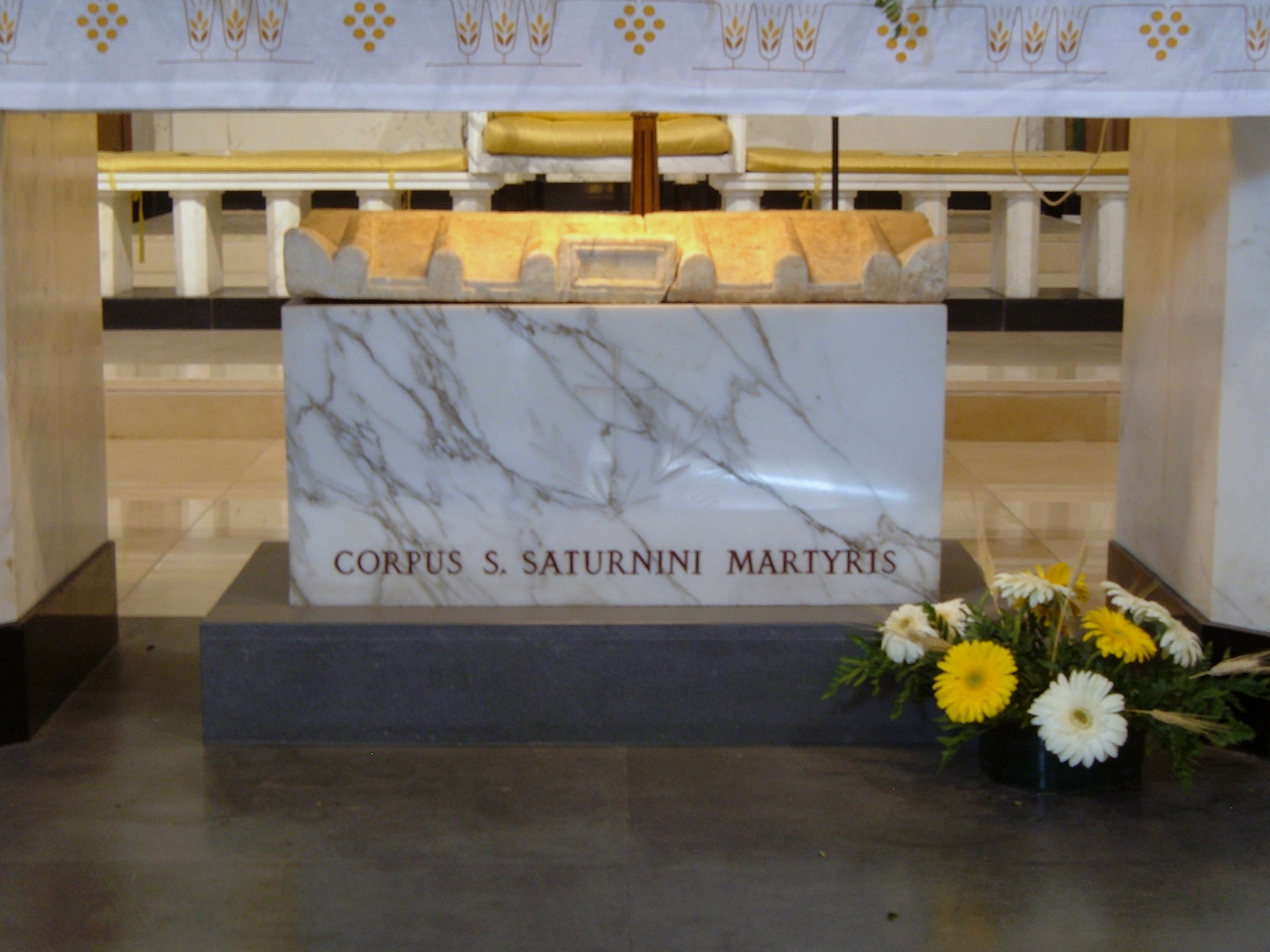 Chiesa di San Saturnino, a Roma, nel quartiere Trieste.